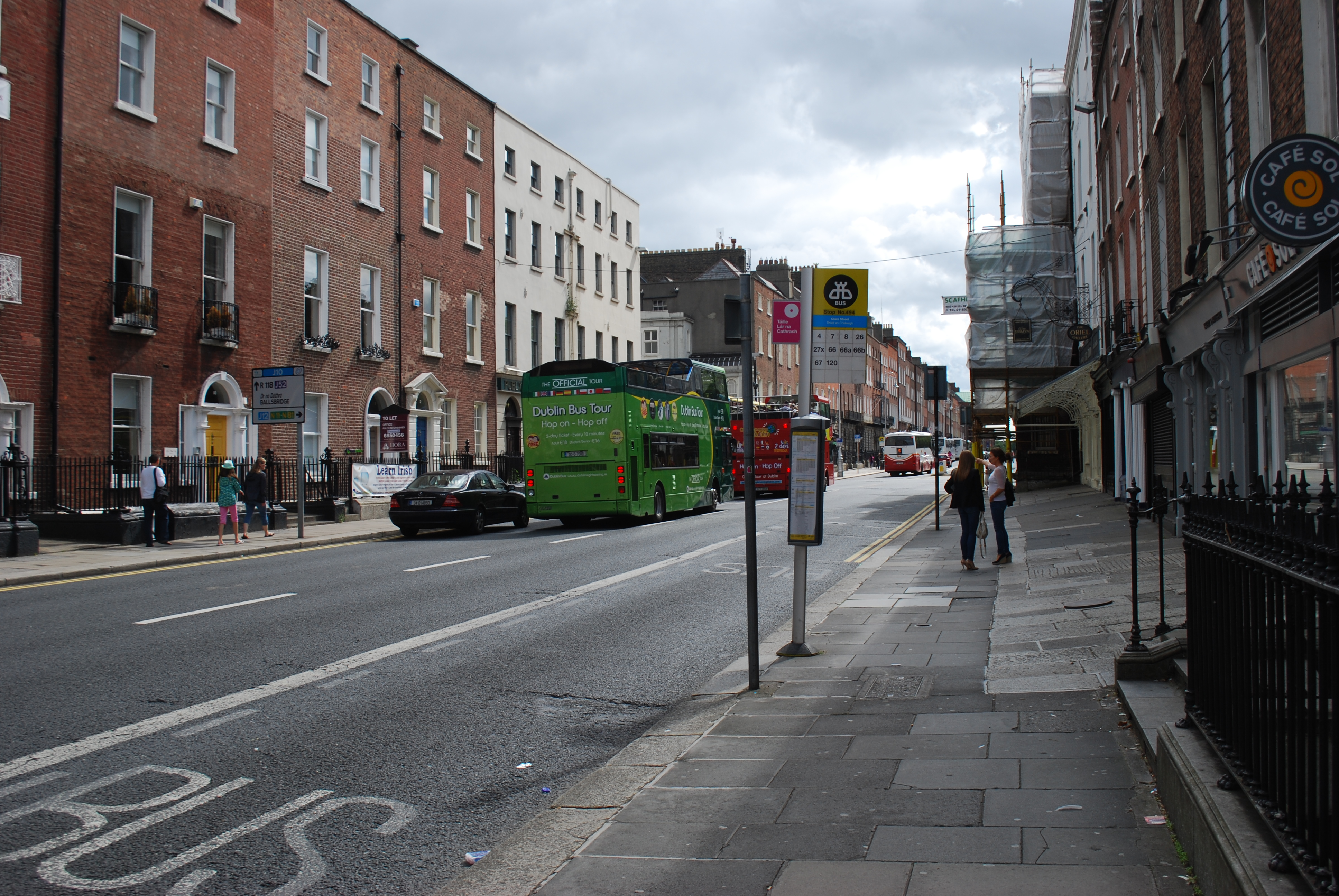 Vue de Clare Street, à Dublin.